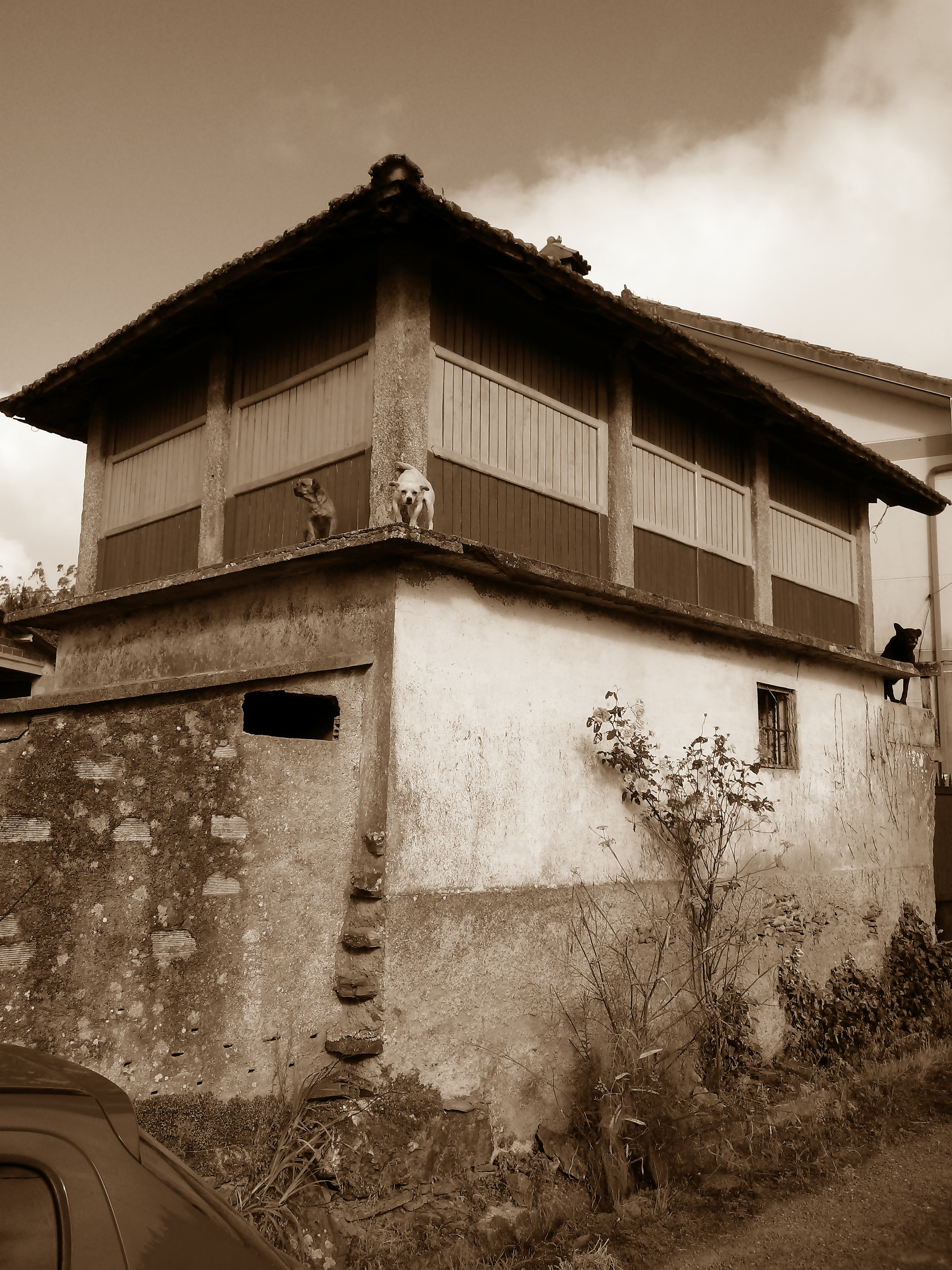 Típico hórreo da área do Pino, de forma rectangular, que conta cuns 30 m². Neste caso é un hórreo con planta baixa pechada para aperos, como é habitual na zona. O pasaventos está pintado coas cores da bandeira española.